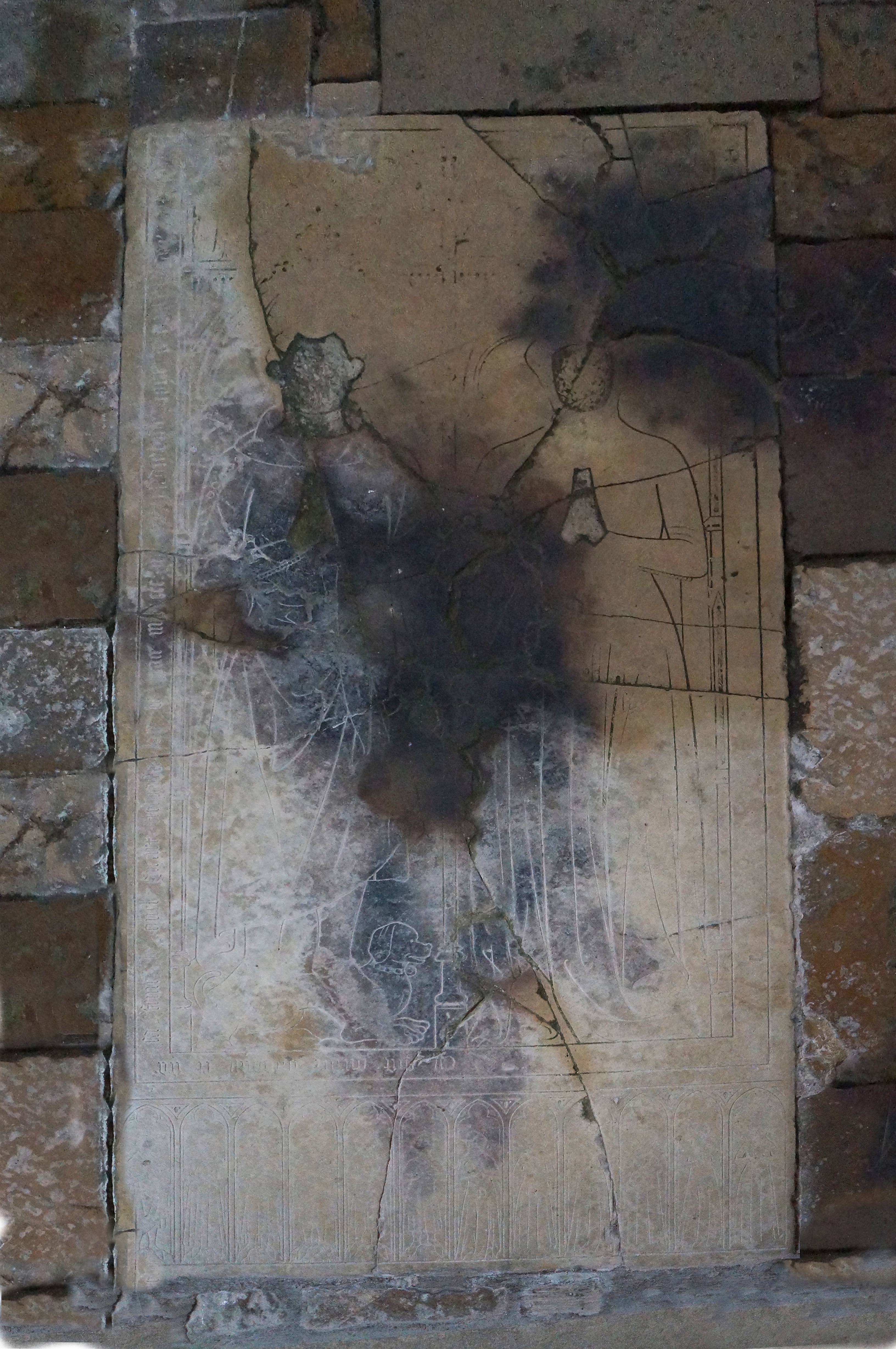 Dalle funéraire de Girard d'Auguy et de sa femme.- Église Notre-Dame de Saint-Père, Saint-Père(Yonne) Yonne Bourgogne, France .